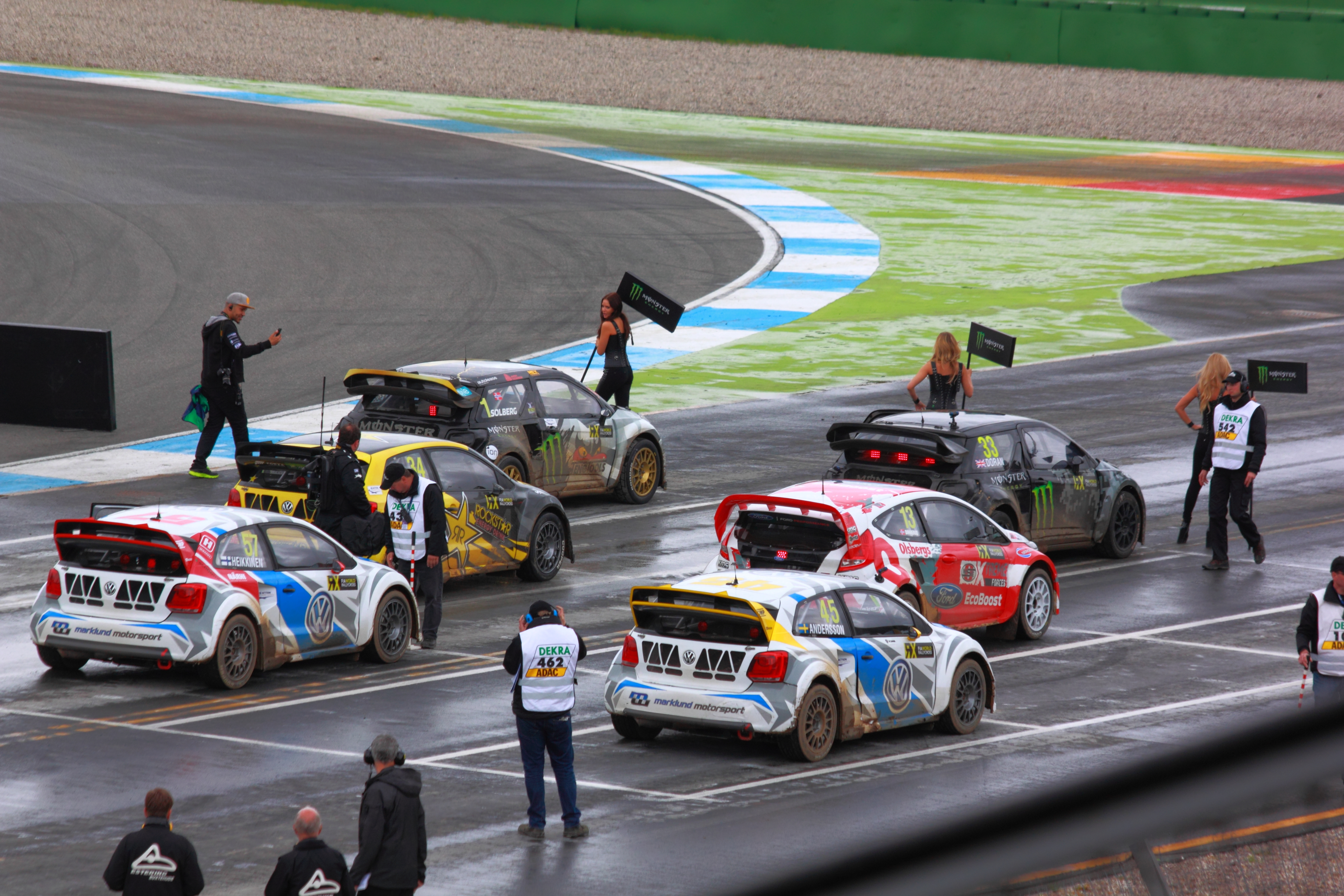 Startaufstellung